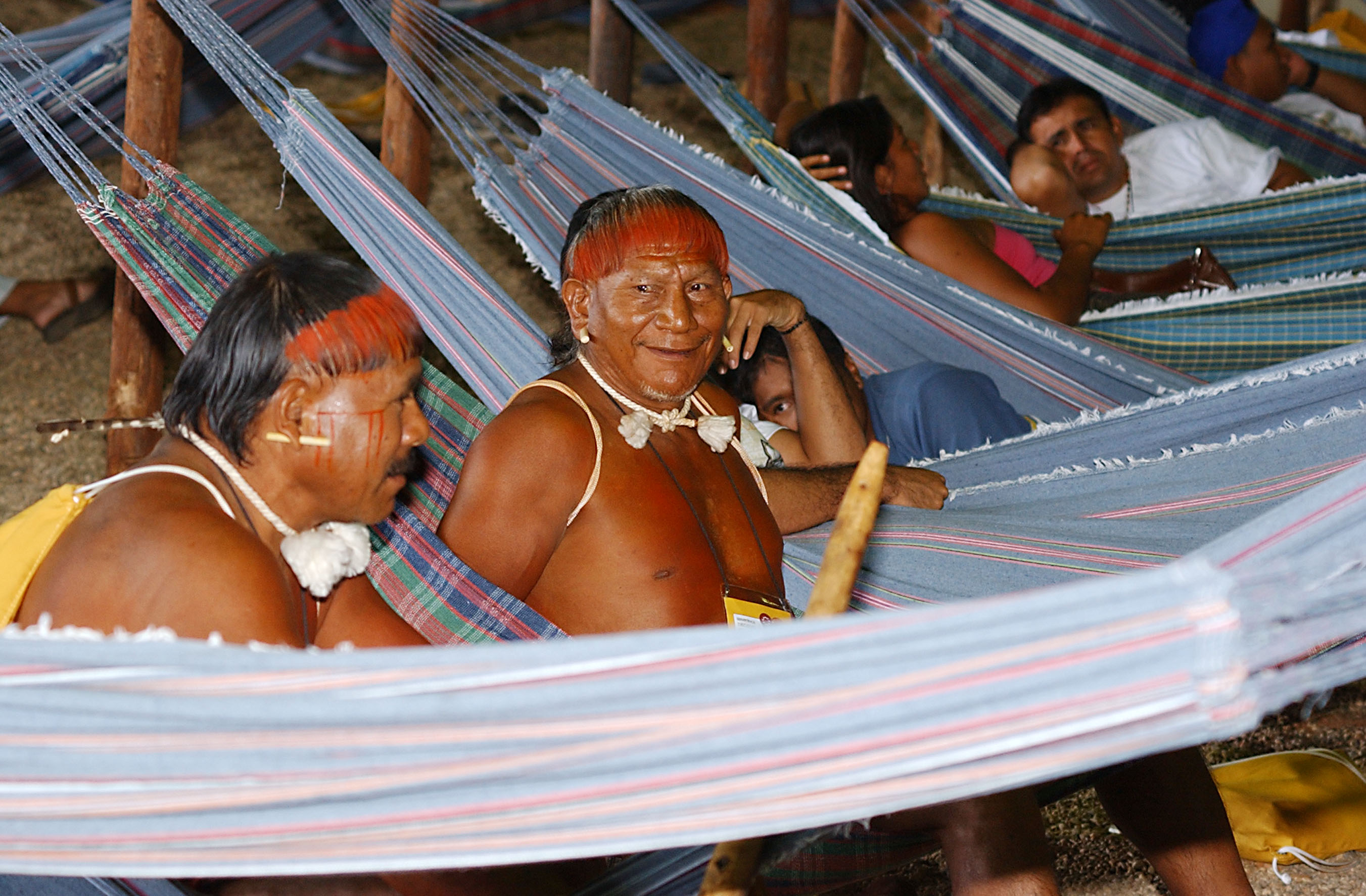 Brasília - Índios em redes durante a 1ª Conferência Nacional dos Povos Indígenas.